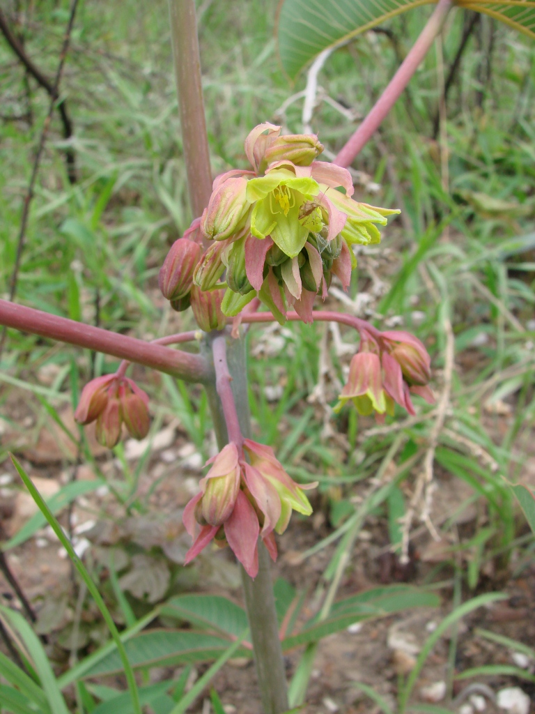 Manihot cecropiifolia Pohl (sin. hom. Manihot violacea var. cecropiifolia (Pohl) Müll.Arg. ) - EUPHORBIACEAE - Poço Azul - Brazlândia - Distrito Federal - Brasil.